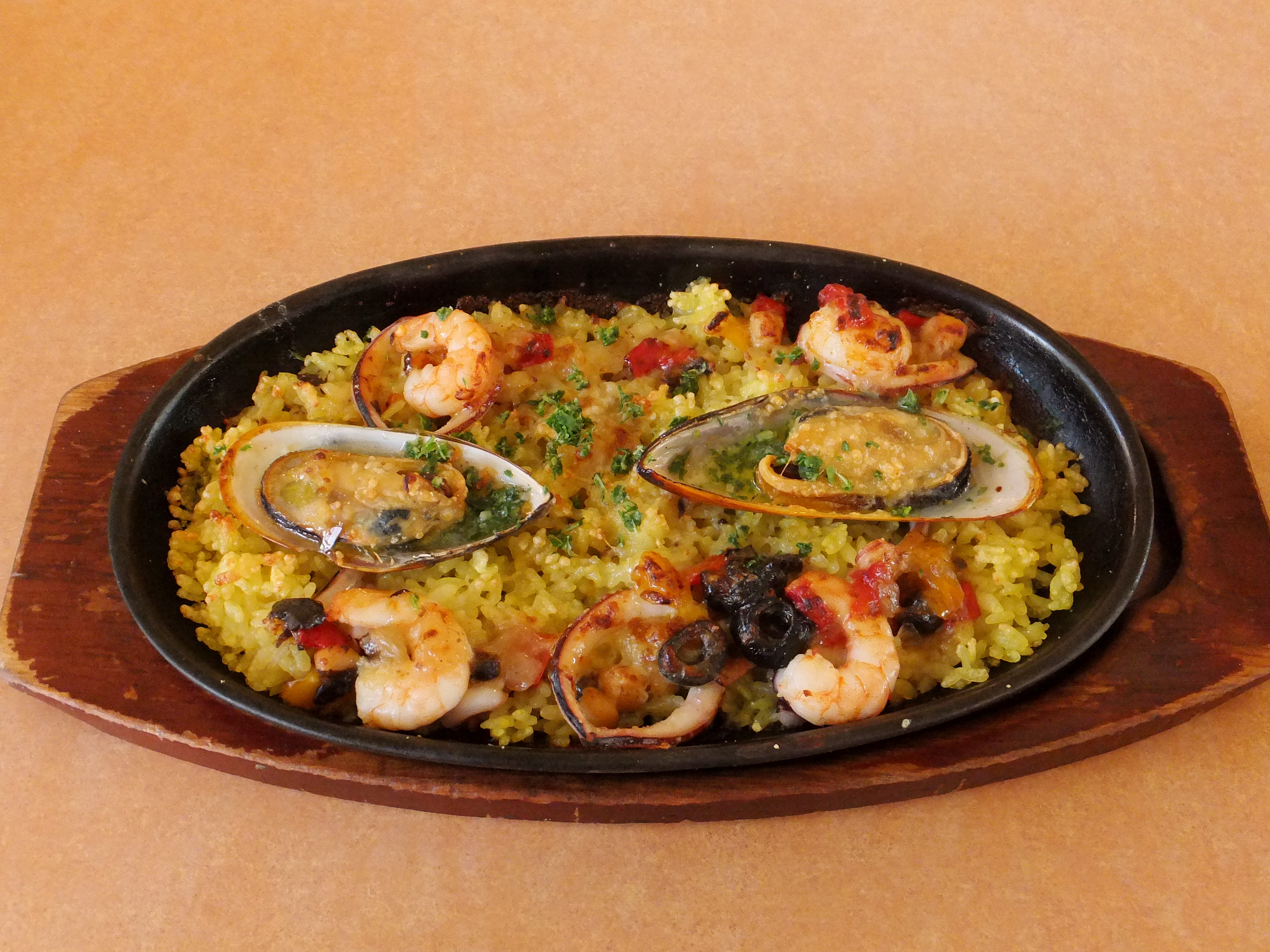 「地中海風ピラフ（パエリア）」。サイゼリヤにて